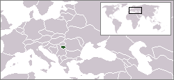 Deze afbeelding heb ik zelf gemaakt, met behulp van de afbeelding Locatie Latveria.PNG. Die afbeelding is door de gebruiker vrijgegeven.